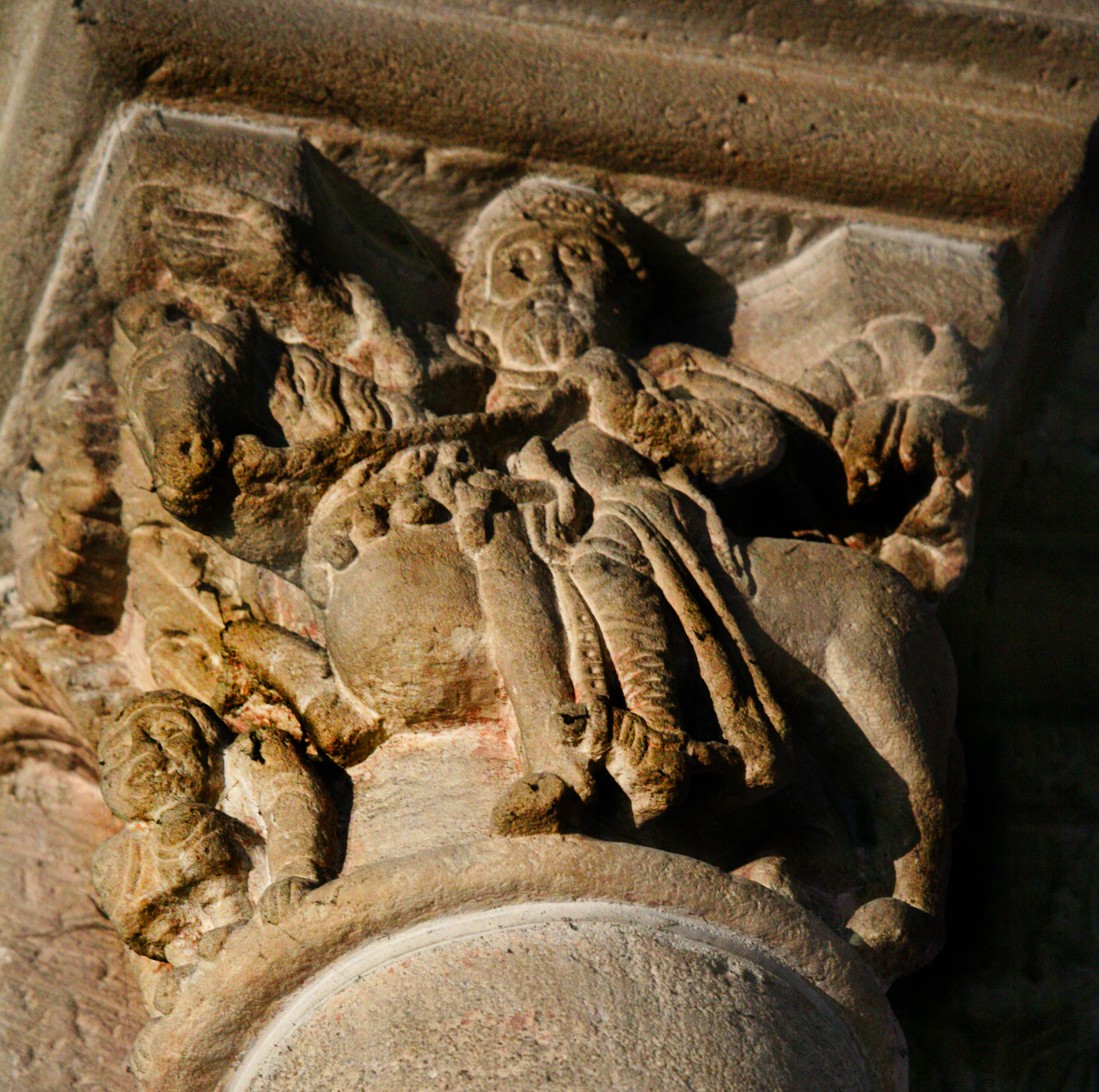 photographie du "croisé triomphant de l'Islam" par Fabien Vivier